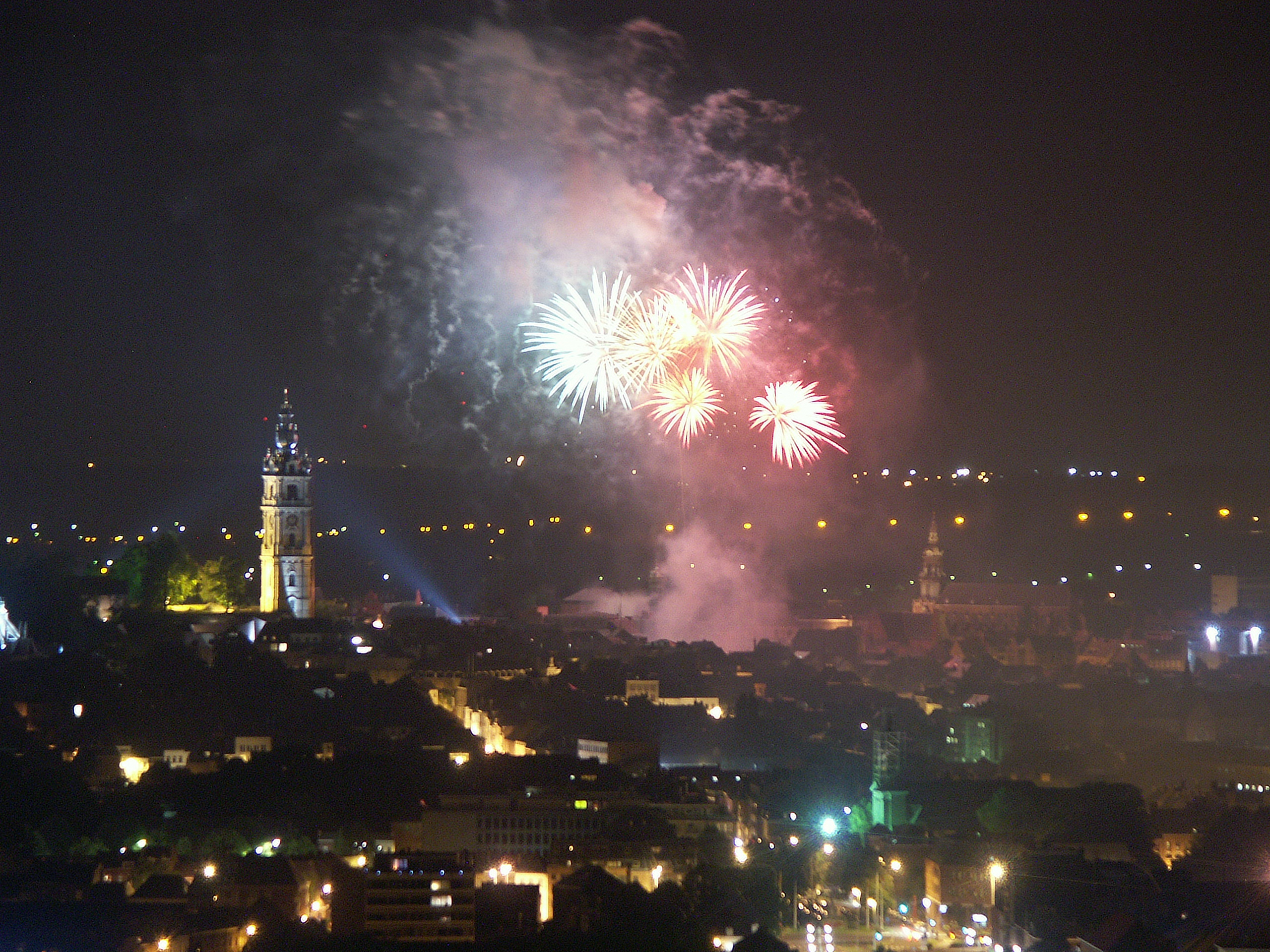 Feu d'artifice clôturant la ducasse de la ville de Mons